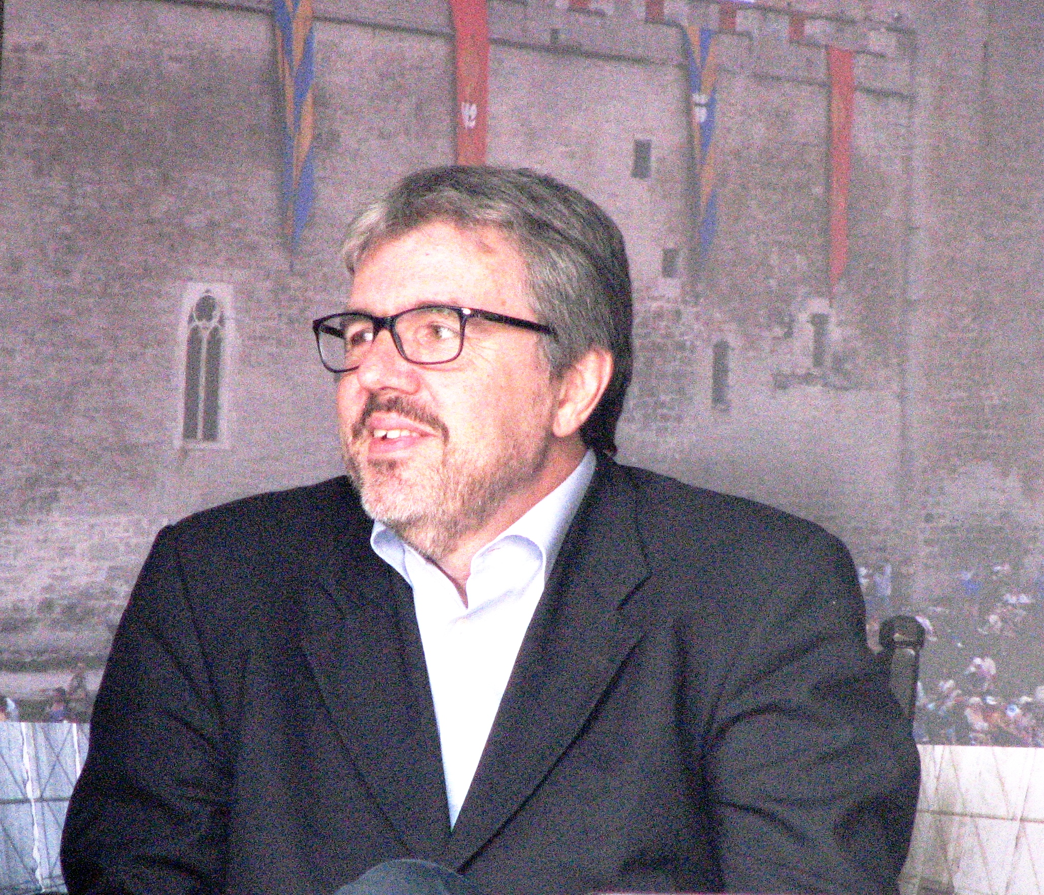 Marco Clemente esinemas Kuressaare Arensburgi ooperikohvikus